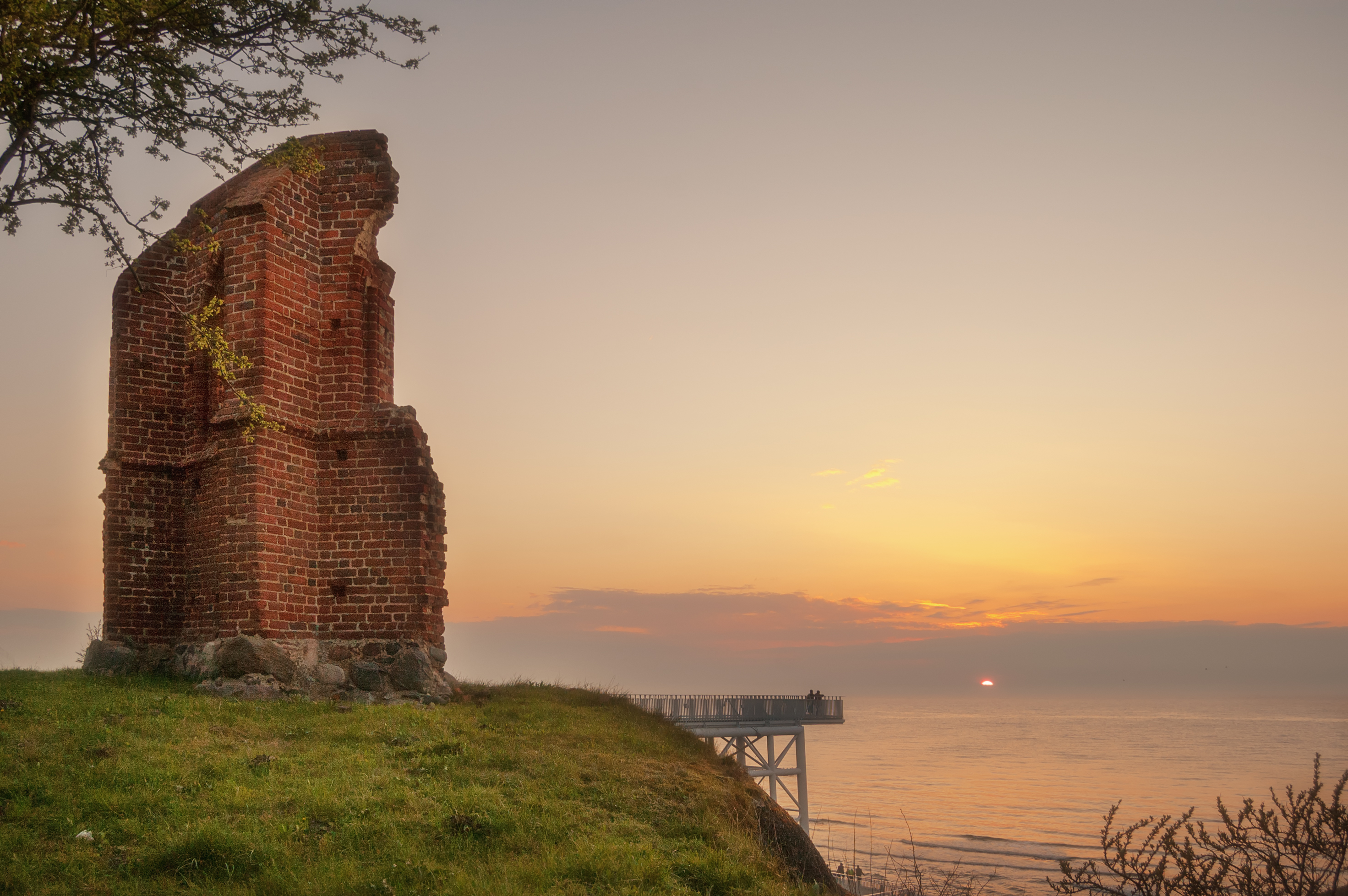 Ruinas de iglesia antigua de Trzęsacz, Polonia, en el Mar Báltico